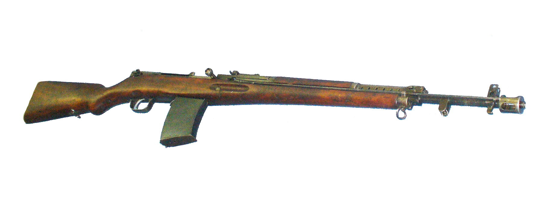 Simonov AVS-36, Soviet self-loading rifle